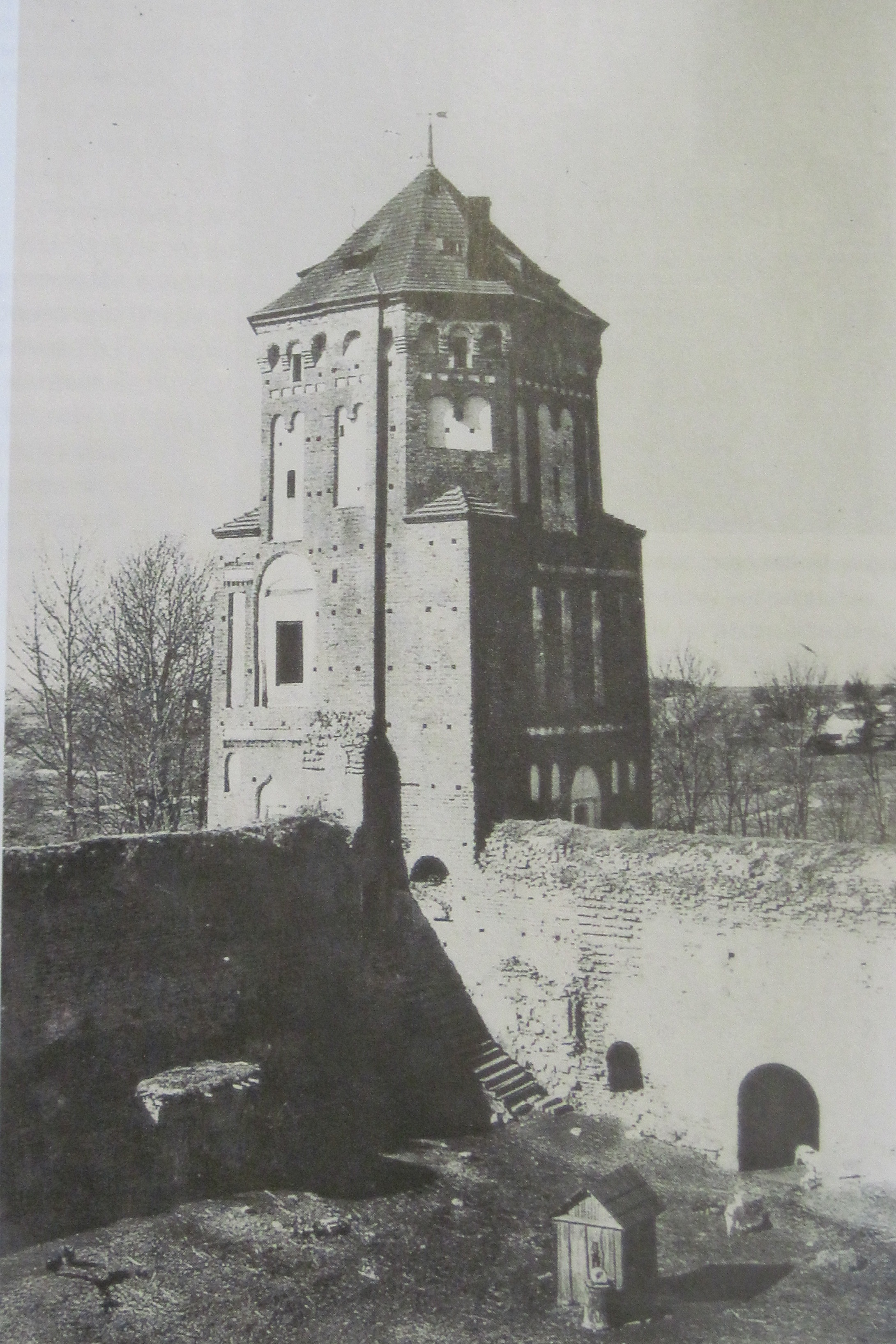 Мірскі замак у 50 гады 20 стагоддзя. Паднёва-заходняя вежа